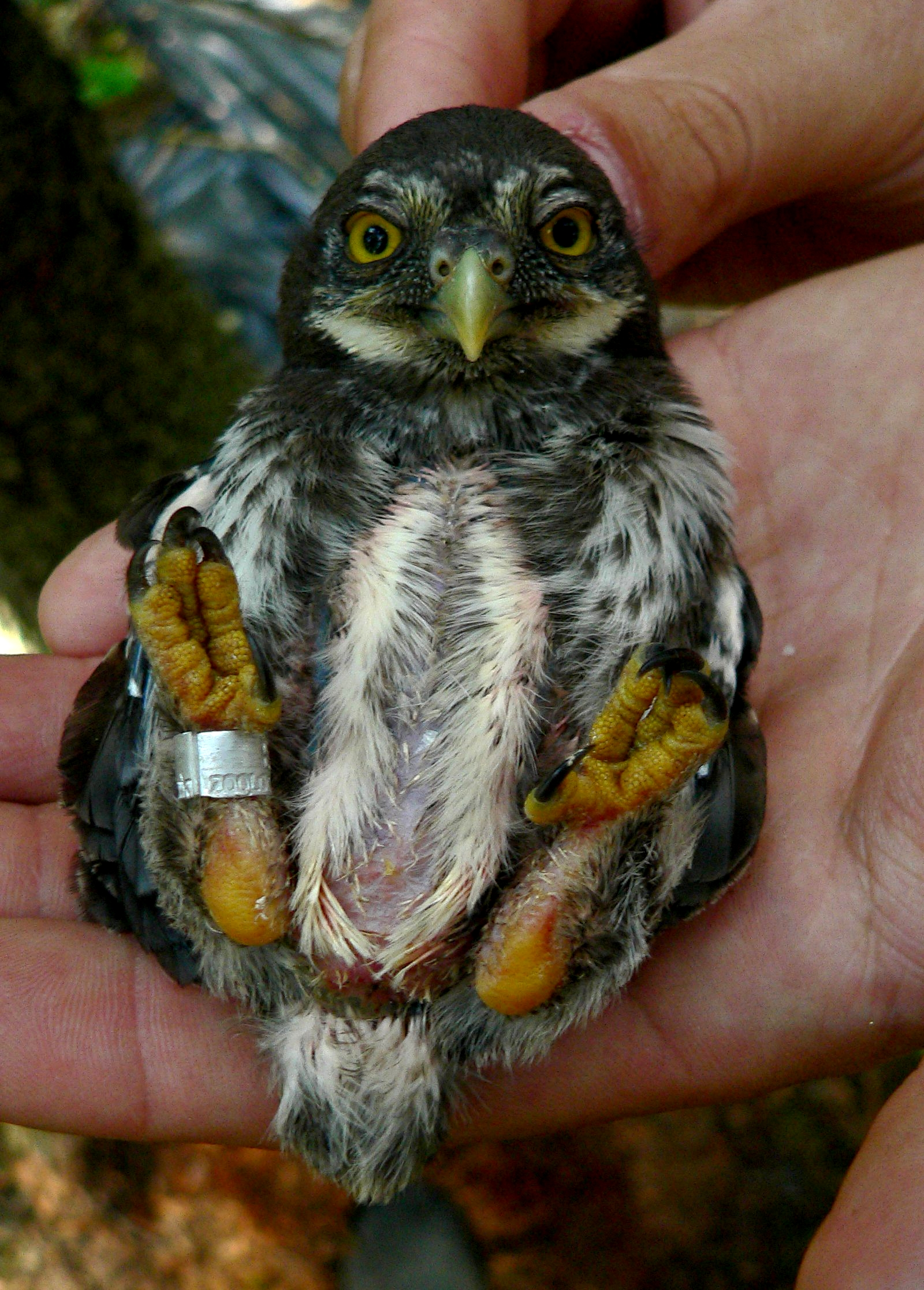 Pygmy owl (Glaucidium passerinum), ringed chicken; western Finland